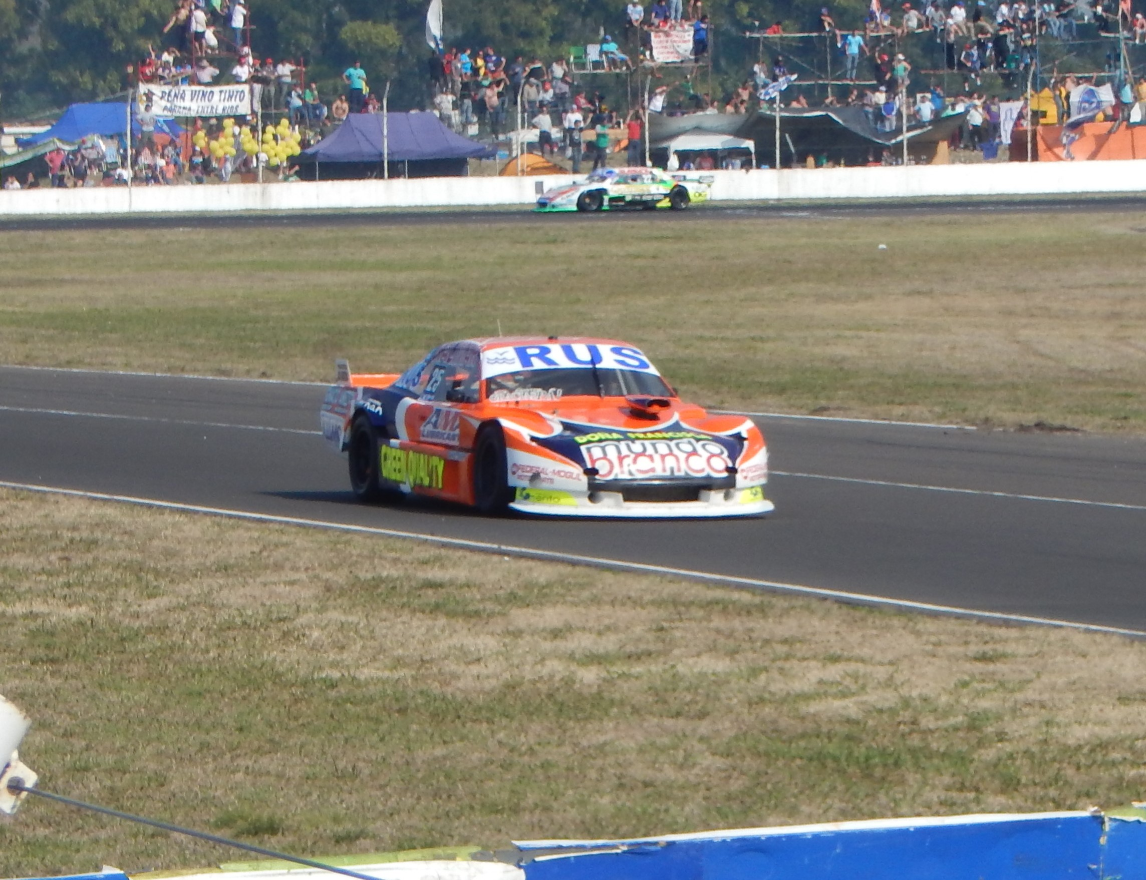 Cristian Di Scala TC Pista en Paraná 2015